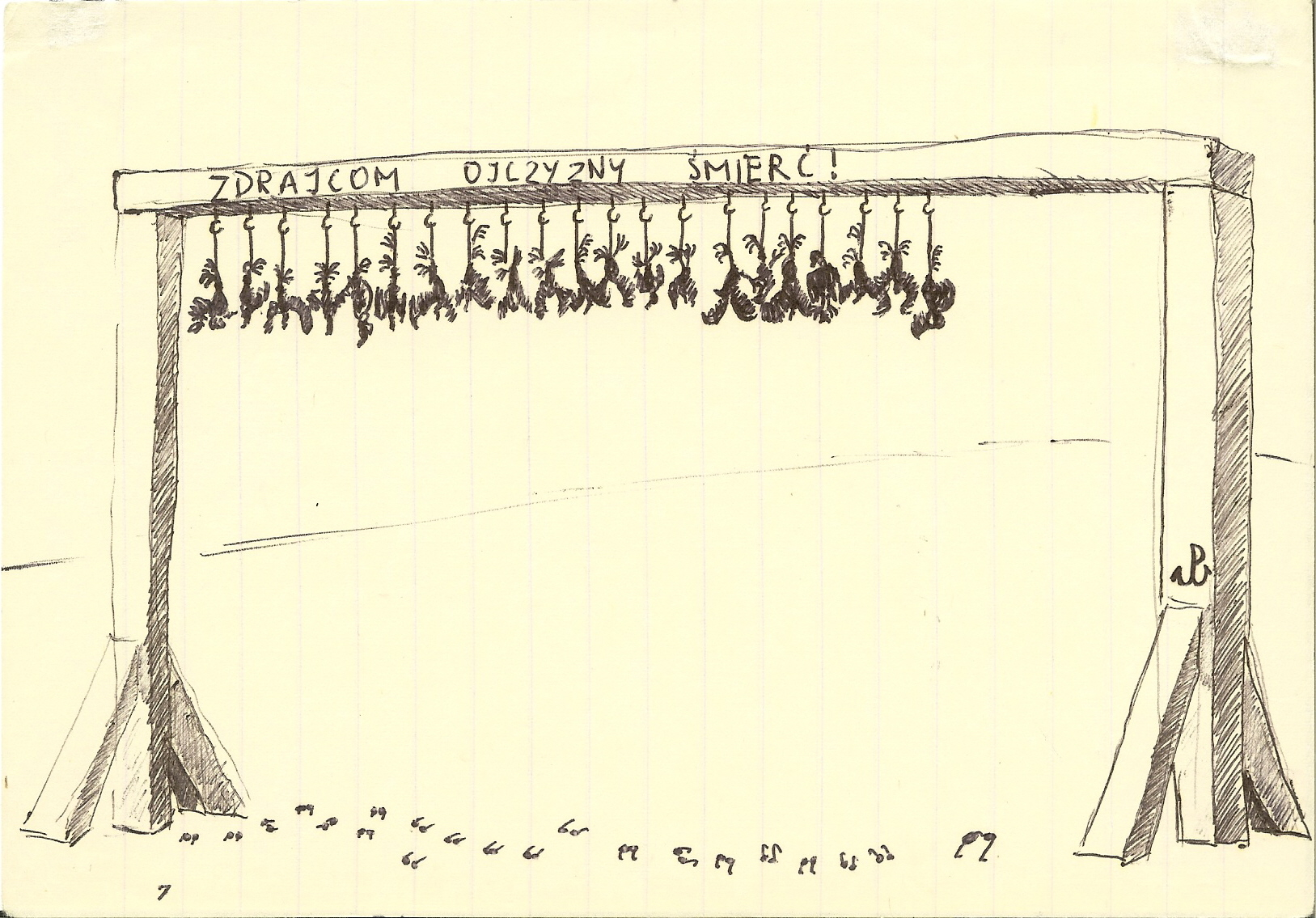 Zdrajcom Ojczyzny Śmierć - karykatura z czasów stanu wojennego, rys. Maciej Miezian